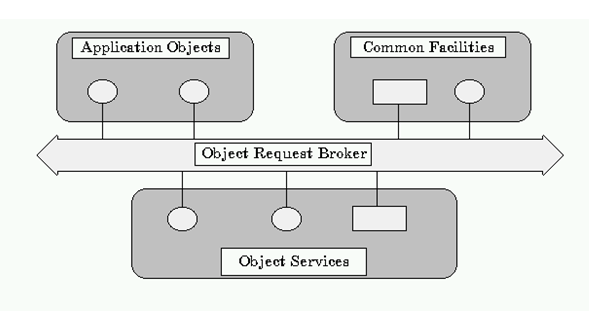 рисунок 2